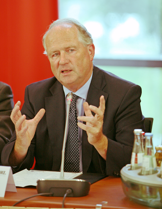 27. August: Heiner Flassbeck